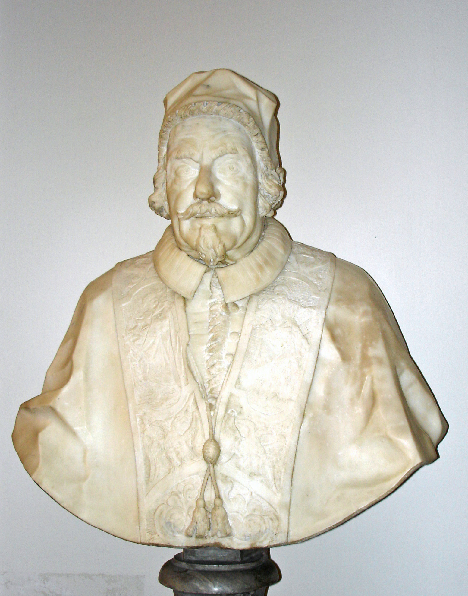 Lorenzo Ottoni: Büste Papst Alexander VIII., Liebieghaus Frankfurt am Main